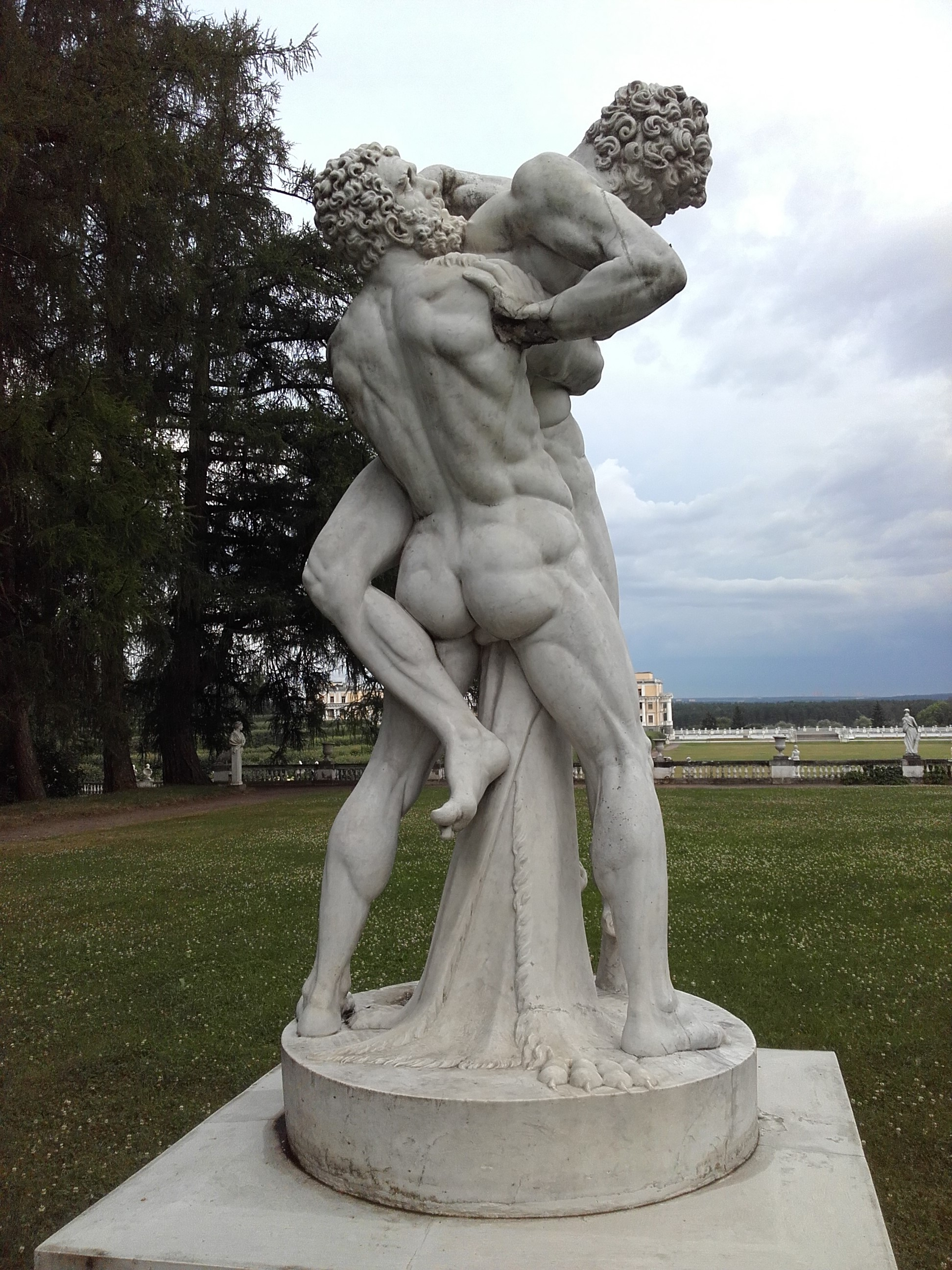 Геракл и Антей